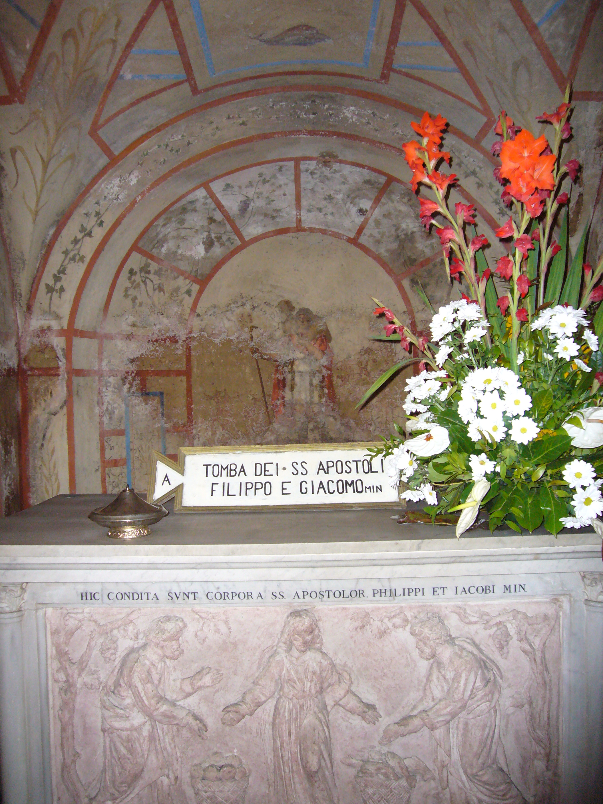 Roma, cripta della basilica dei Santi Apostoli, tomba degli apostoli Filippo e Giacomo